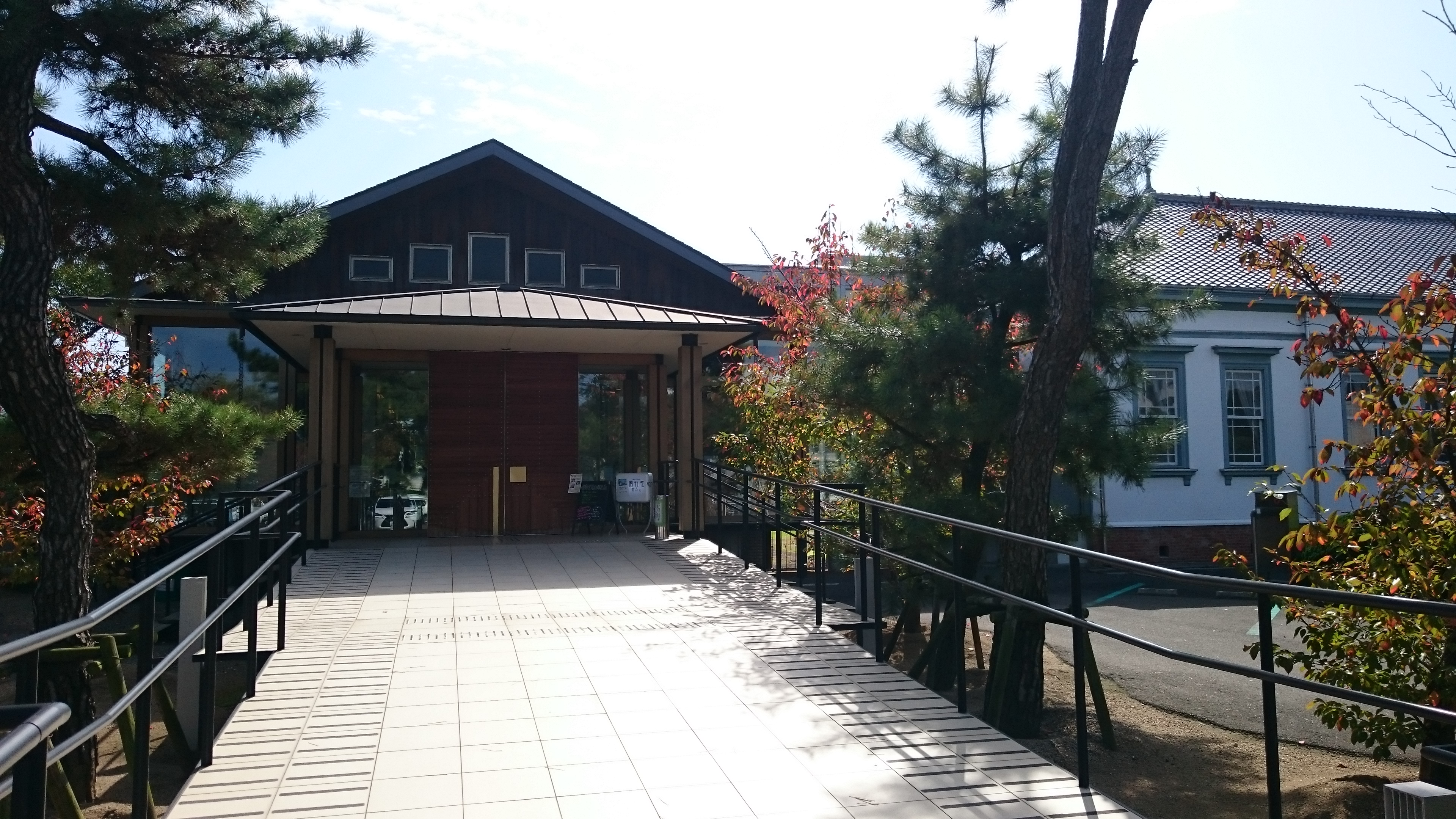 旧善通寺偕行社のカフェ入口付近